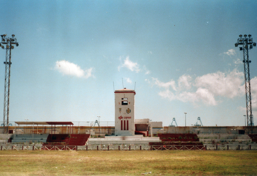 Estadio de El Mirador en los días previos a su demolición en 1999. Vista de la torre del Marcador. Este estadio de fútbol fue construido en 1954 en los terrenos próximos a la playa de Los Ladrillos de Algeciras, Andalucía, España.